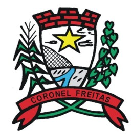 Blason de la municipalité de Coronel Freitas - Brésil